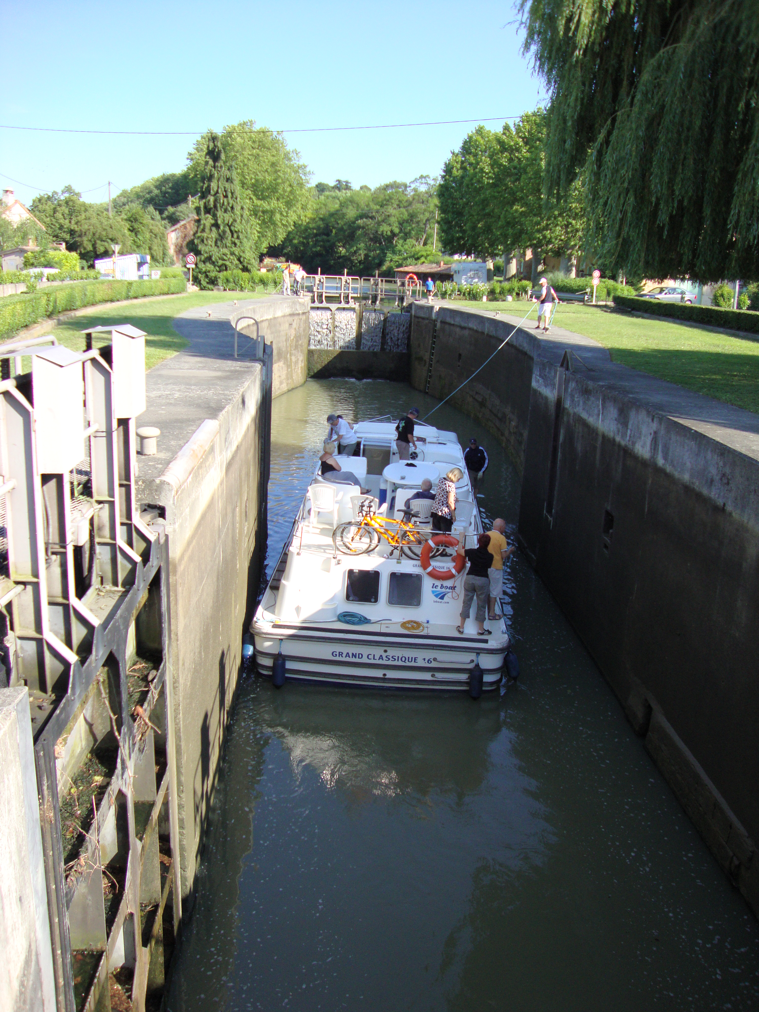 Montgiscard (Haute-Garonne, Fr) Canal du Midi, écluse avec bateau